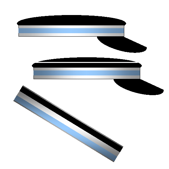 Couleur des Corps Brunsviga Göttingen, mit Corpsburschenmütze, Fuchsenmütze und Corpsburschenband (von oben nach unten) in schwarz-weiß-hellblau